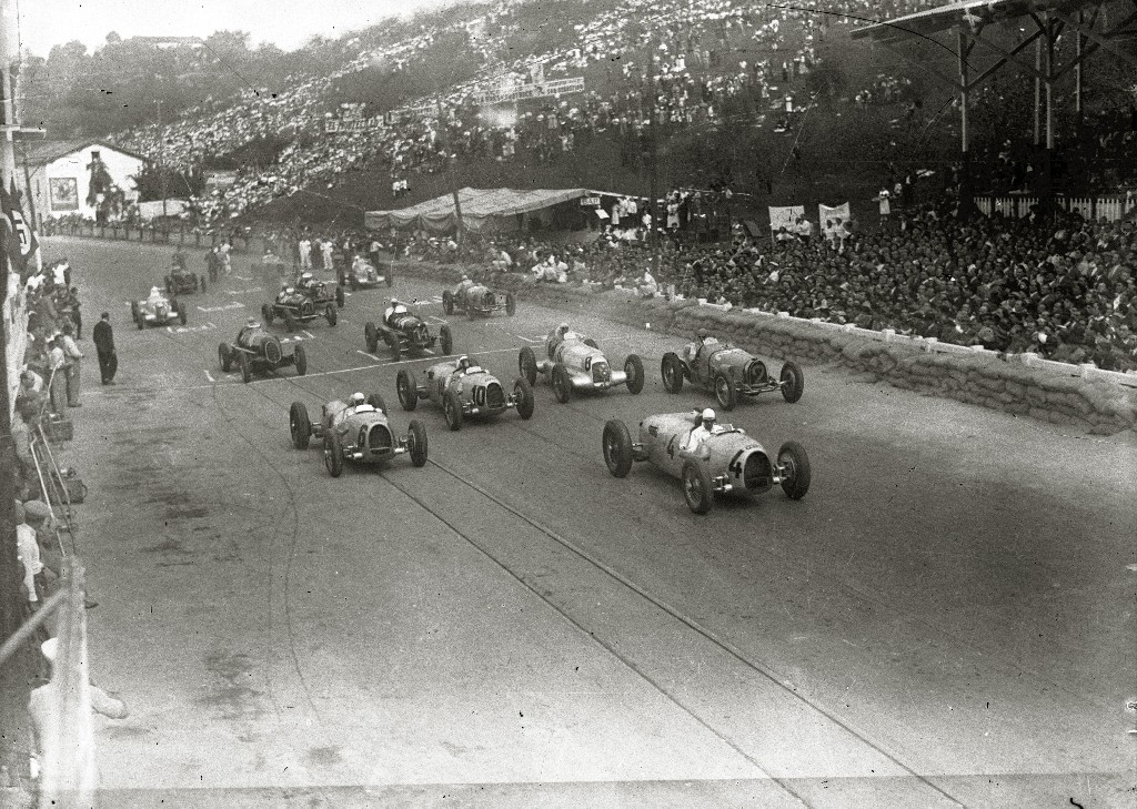 Título original: Carrera automóvilistica en el circuito de Lasarte (385/493) Localización: Circuito de Lasarte (Guipúzcoa)